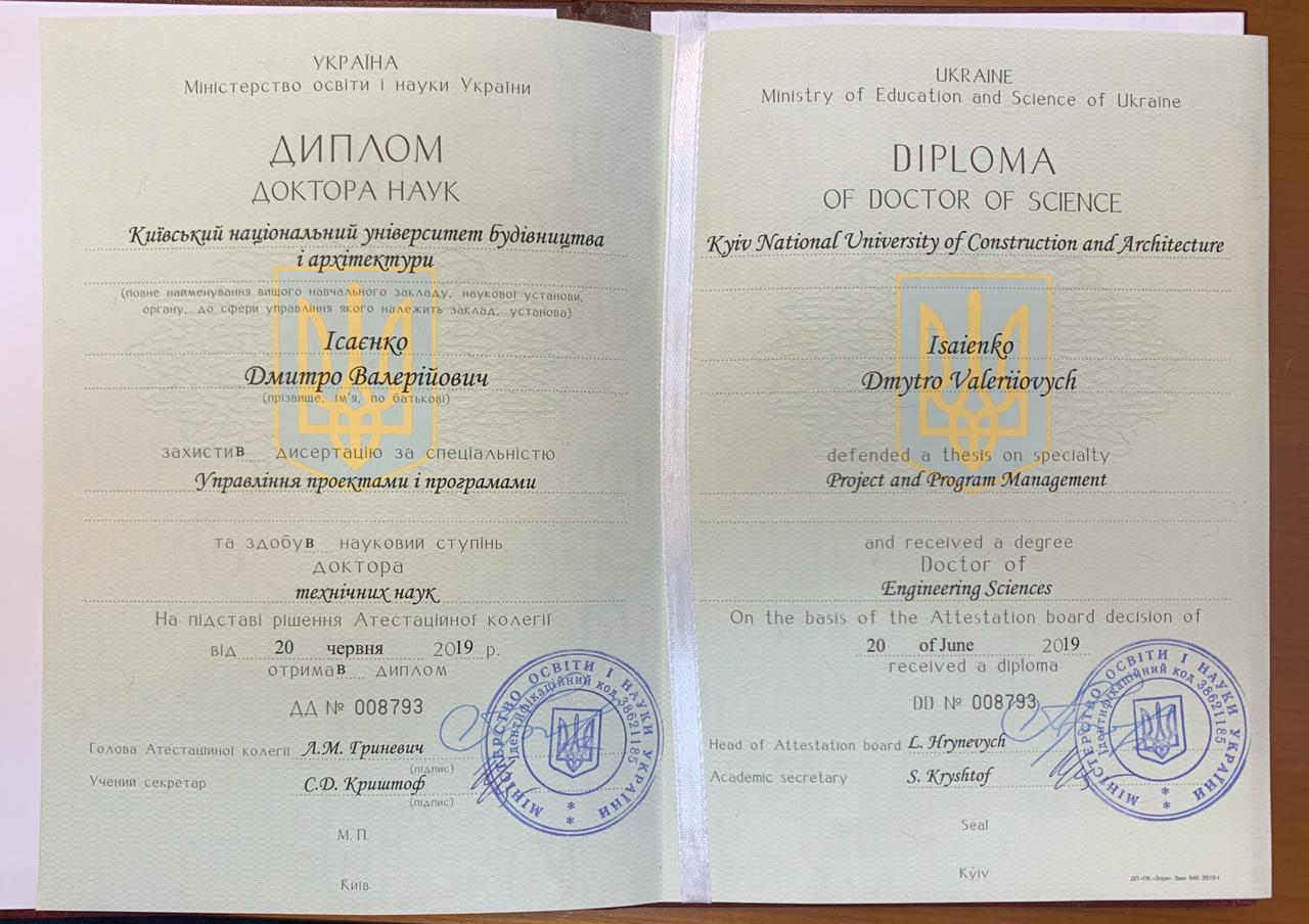 Диплом Дмитра Валерійовича Ісаєнка